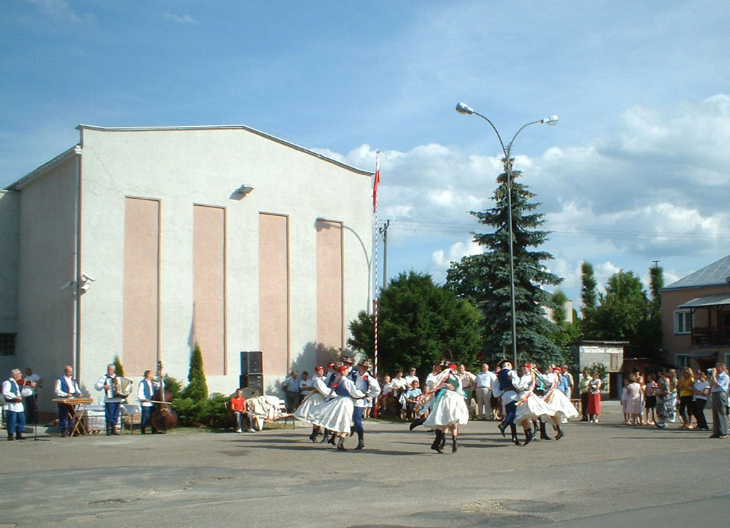 Głowienka,kapela i zespół "Pogórzanie"